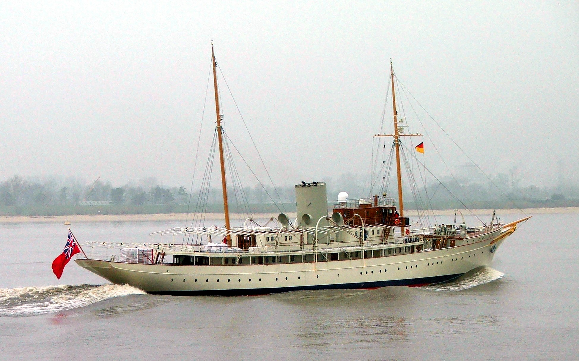 Restaurierte Yacht Nahlin auf Werftprobefahrt